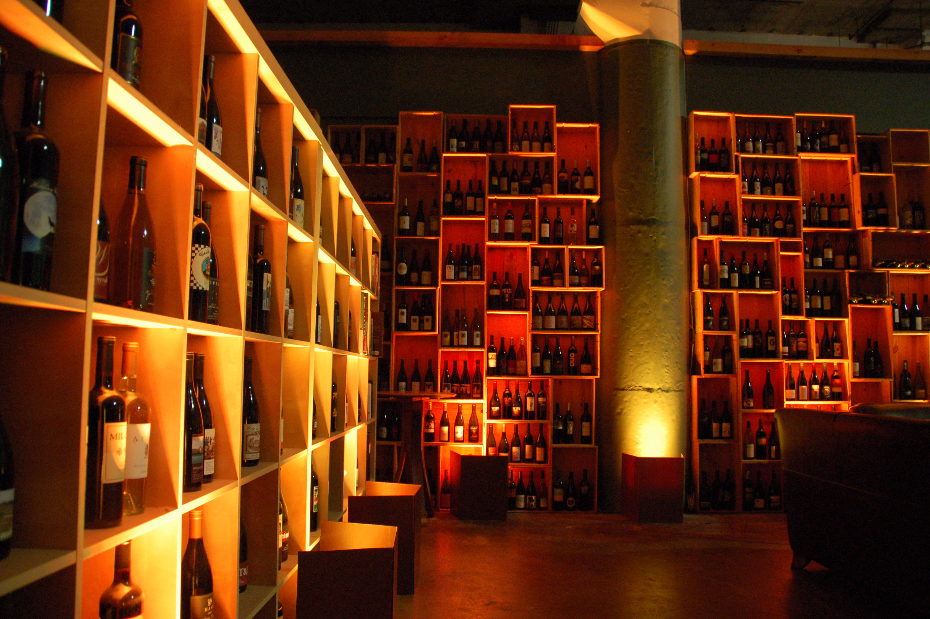 Exposition des vins chez Crushpad